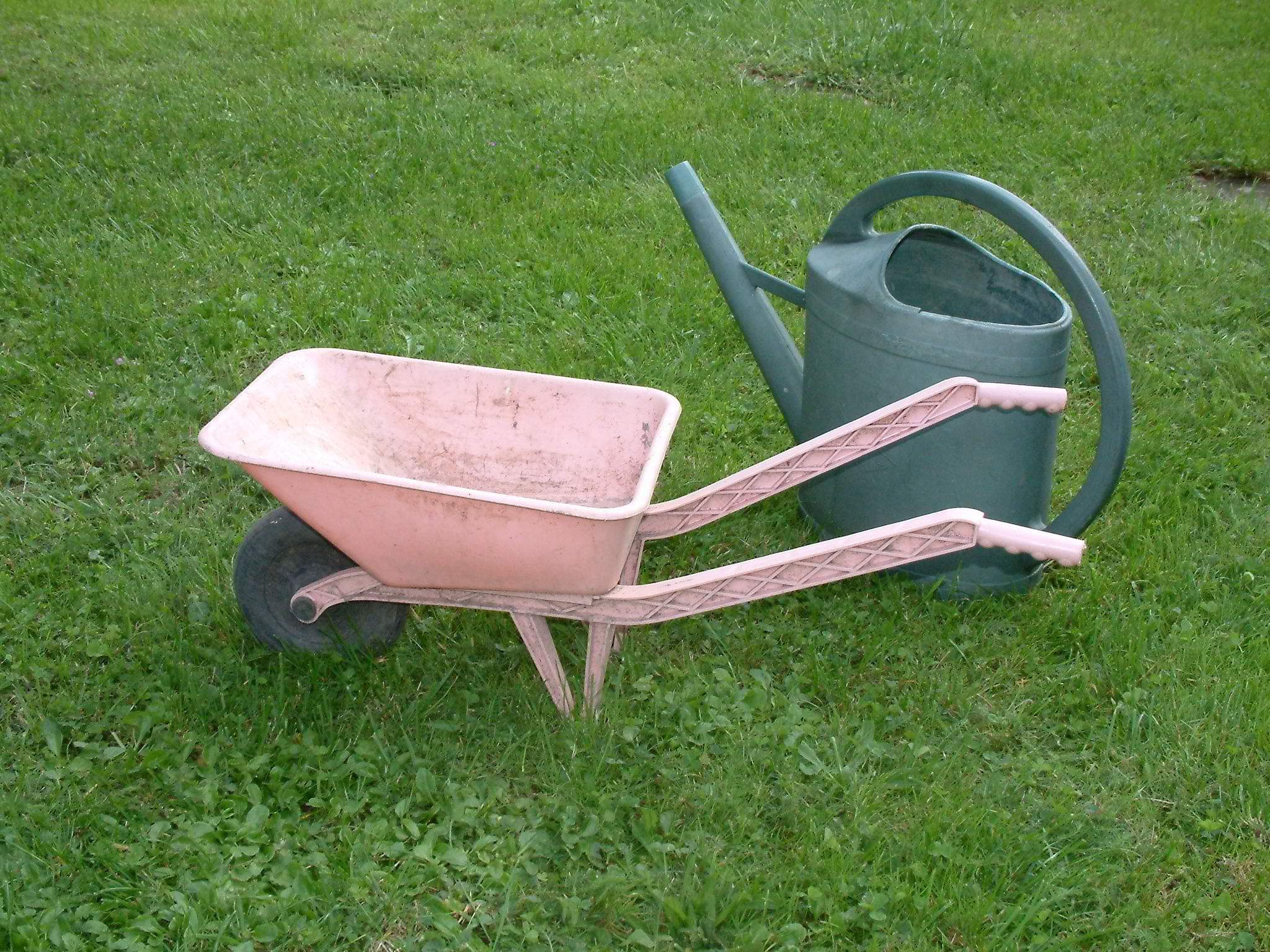 Brouette pour enfant en plastique, France, vers 1980